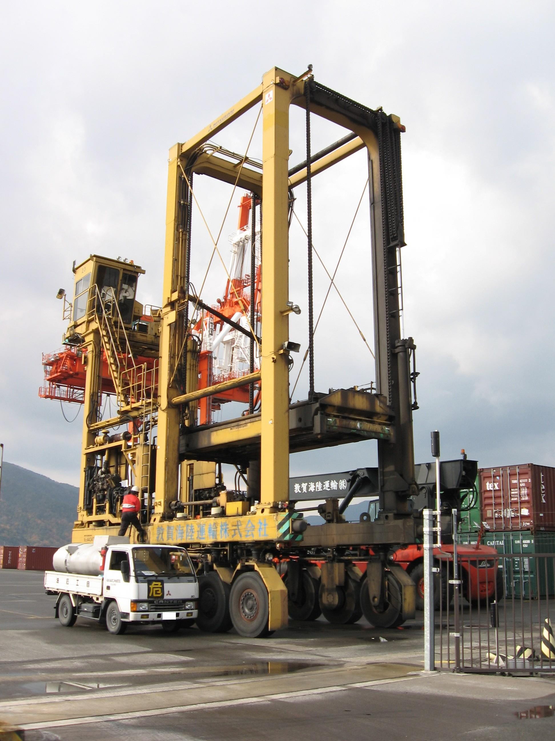 関連資料画像。 福井県／敦賀コンテナターミナルで、2tタンクローリー車の上からストラドルキャリアに燃料を給油している風景。 参考までに、この三菱キャンター型2tタンクローリー車の運転室の高さは、成人男性の平均身長、約170㎝とほぼ同等である。